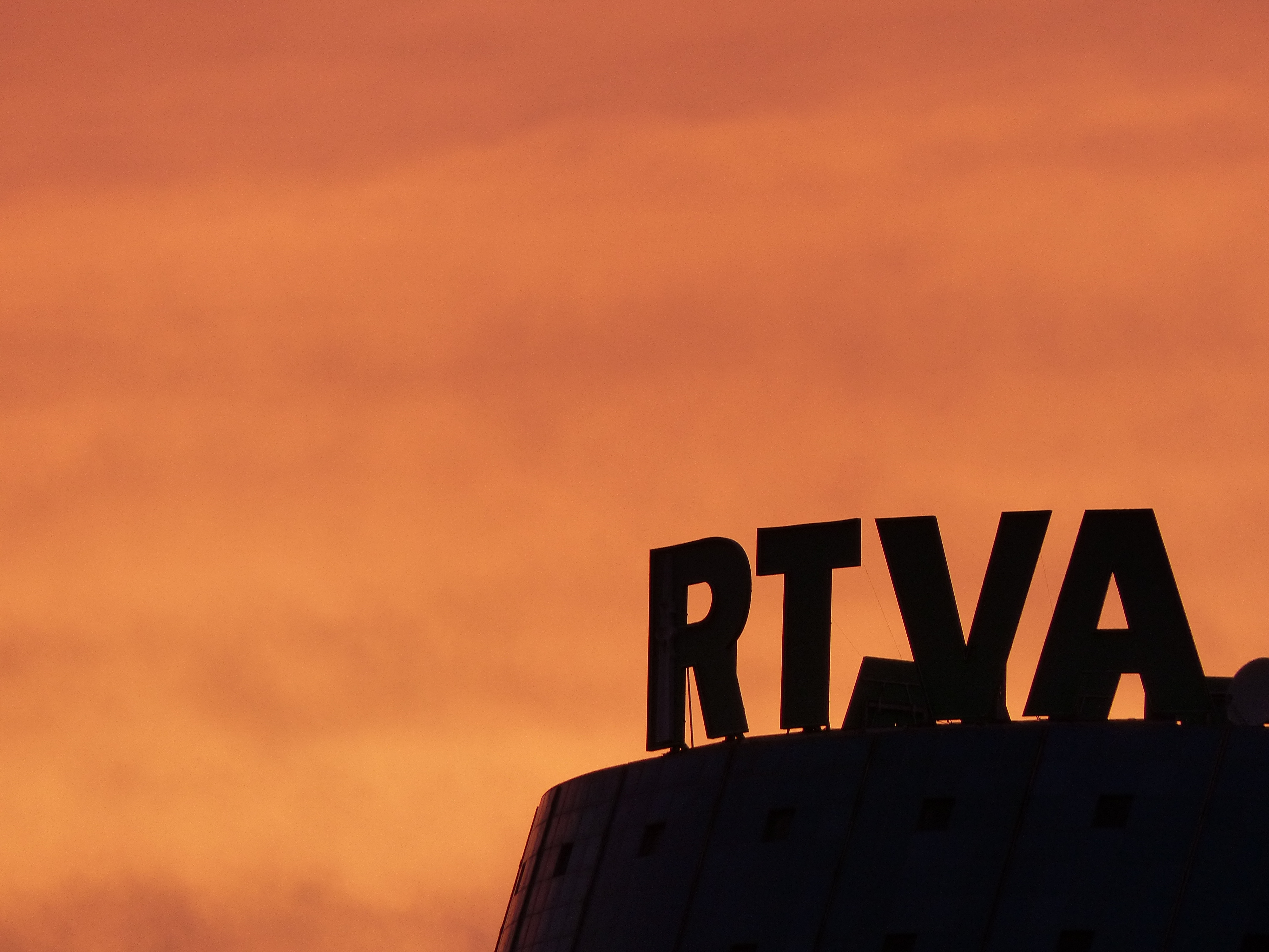 Radio y Televisión de Andalucía desde el Guadalquivir.